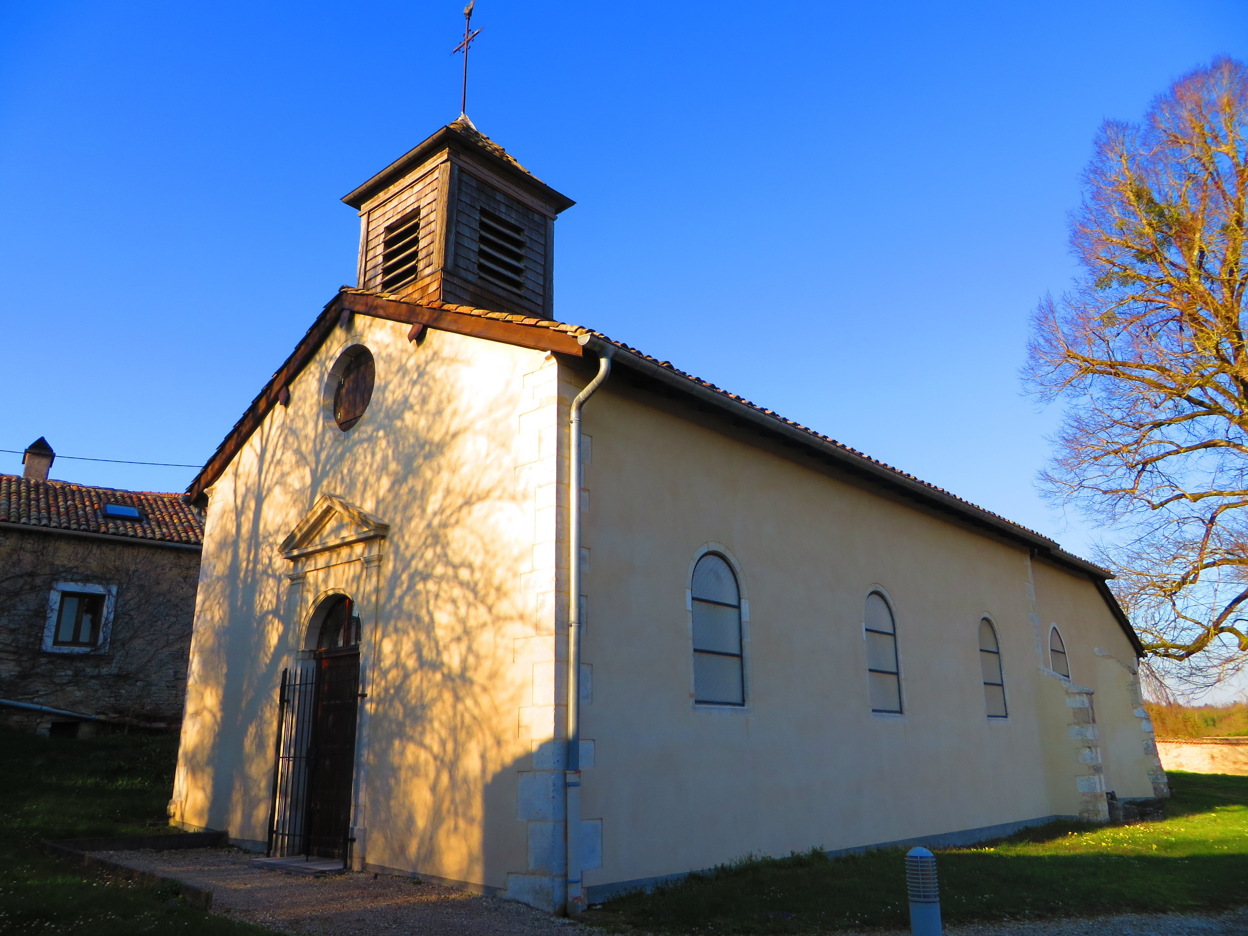 Les Roises L'église de la Nativité-de-la-Vierge